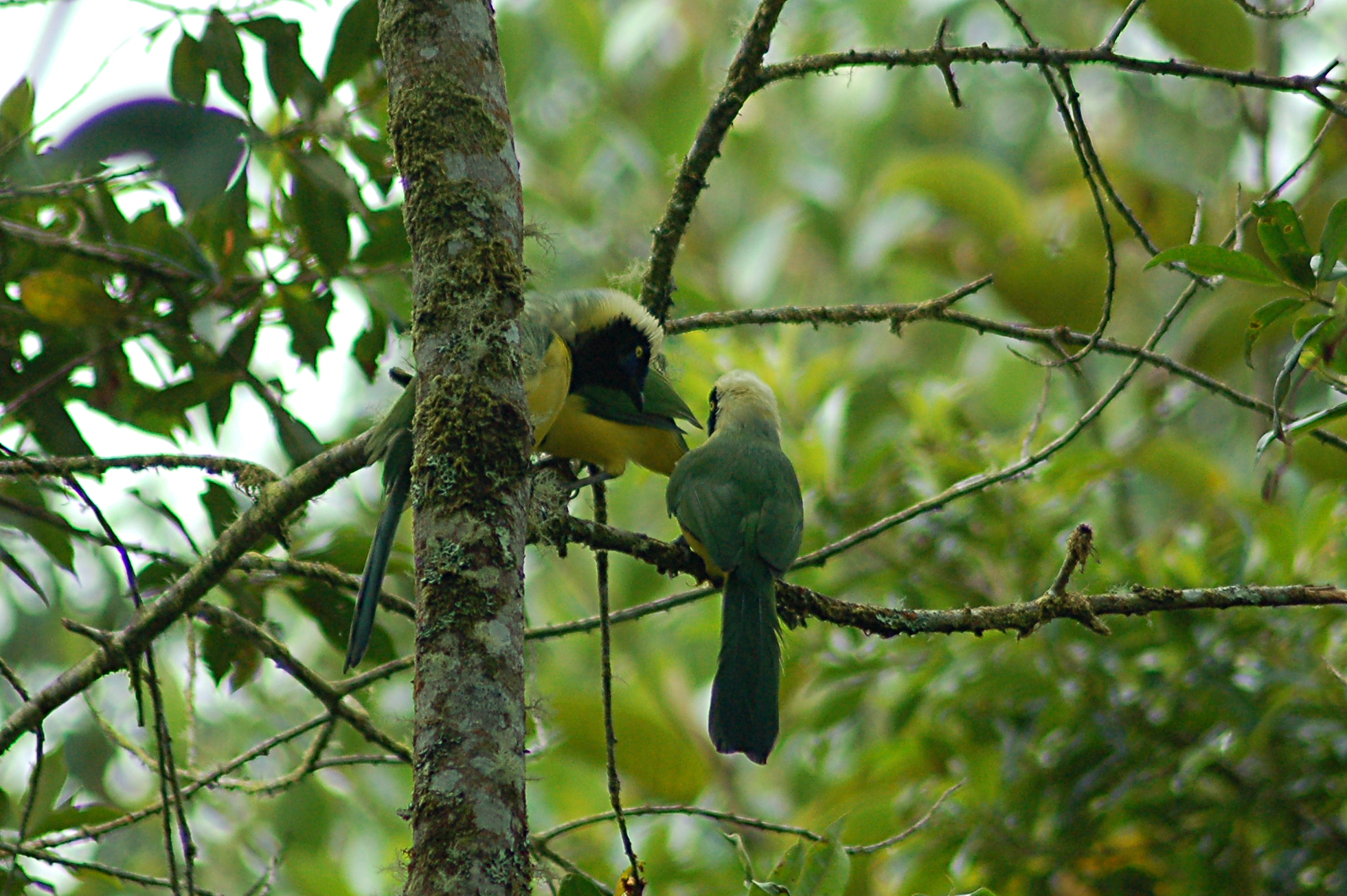 Inca Jay Cyanocorax yncas - 12 June 2015 - Cabañas San Isidro, Napo Province, Ecuador